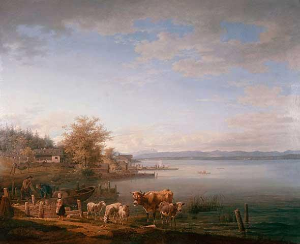 "Ostufer des Starnberger Sees"; Öl auf Leinwand, 134 x 164 cm, Gemälde von Max Joseph Wagenbauer